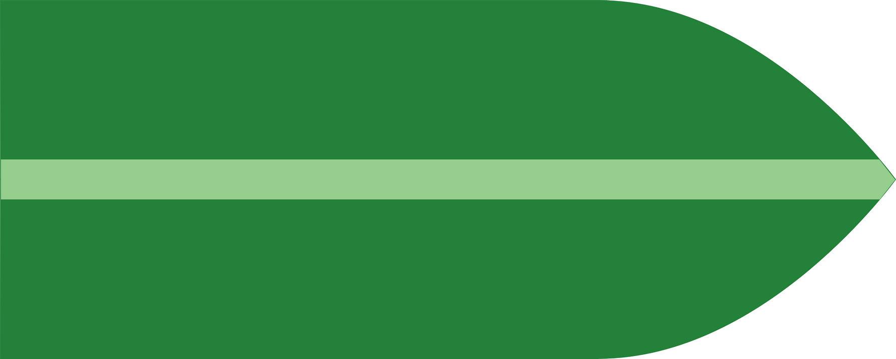 Barwy 10 baterii przeciwpancernej 2 Warszawskiego Pułku Artylerii Lekkiej Polskich Sił Zbrojnych na Zachodzie